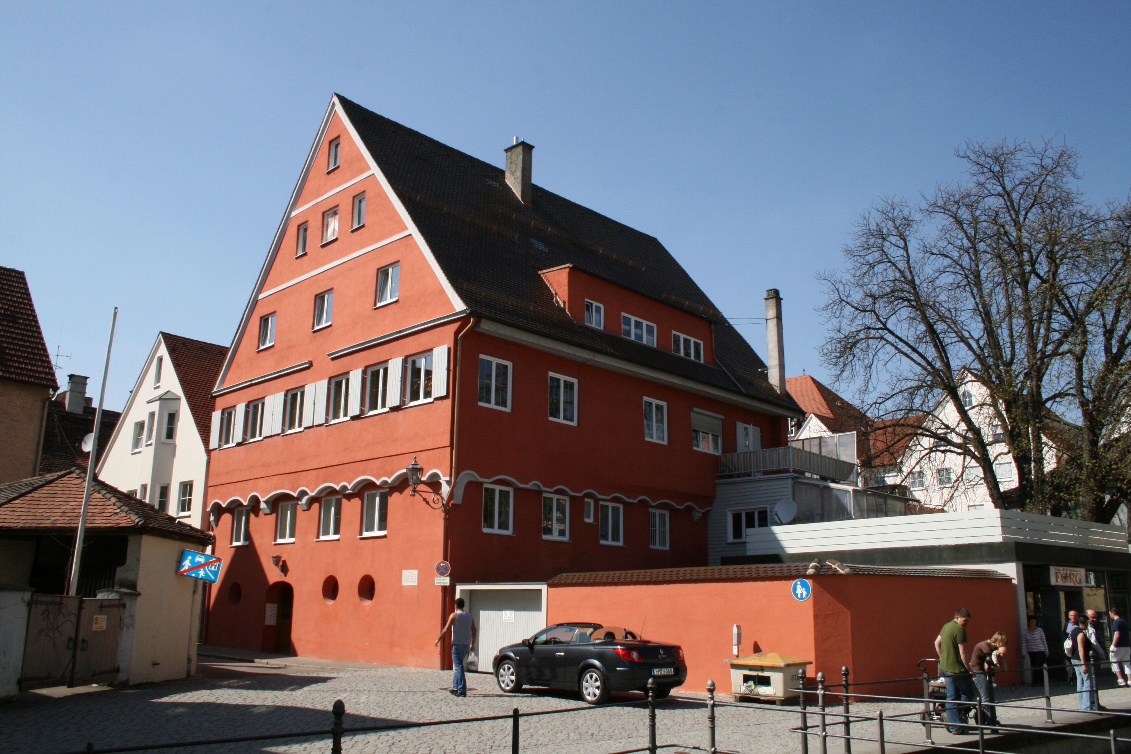 Das Roter Haus, ehemaliger Stadtklosterhof des Klosters Rot an der Rot